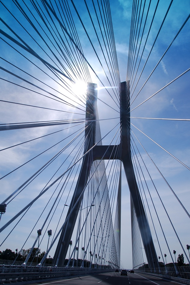 Wrocław